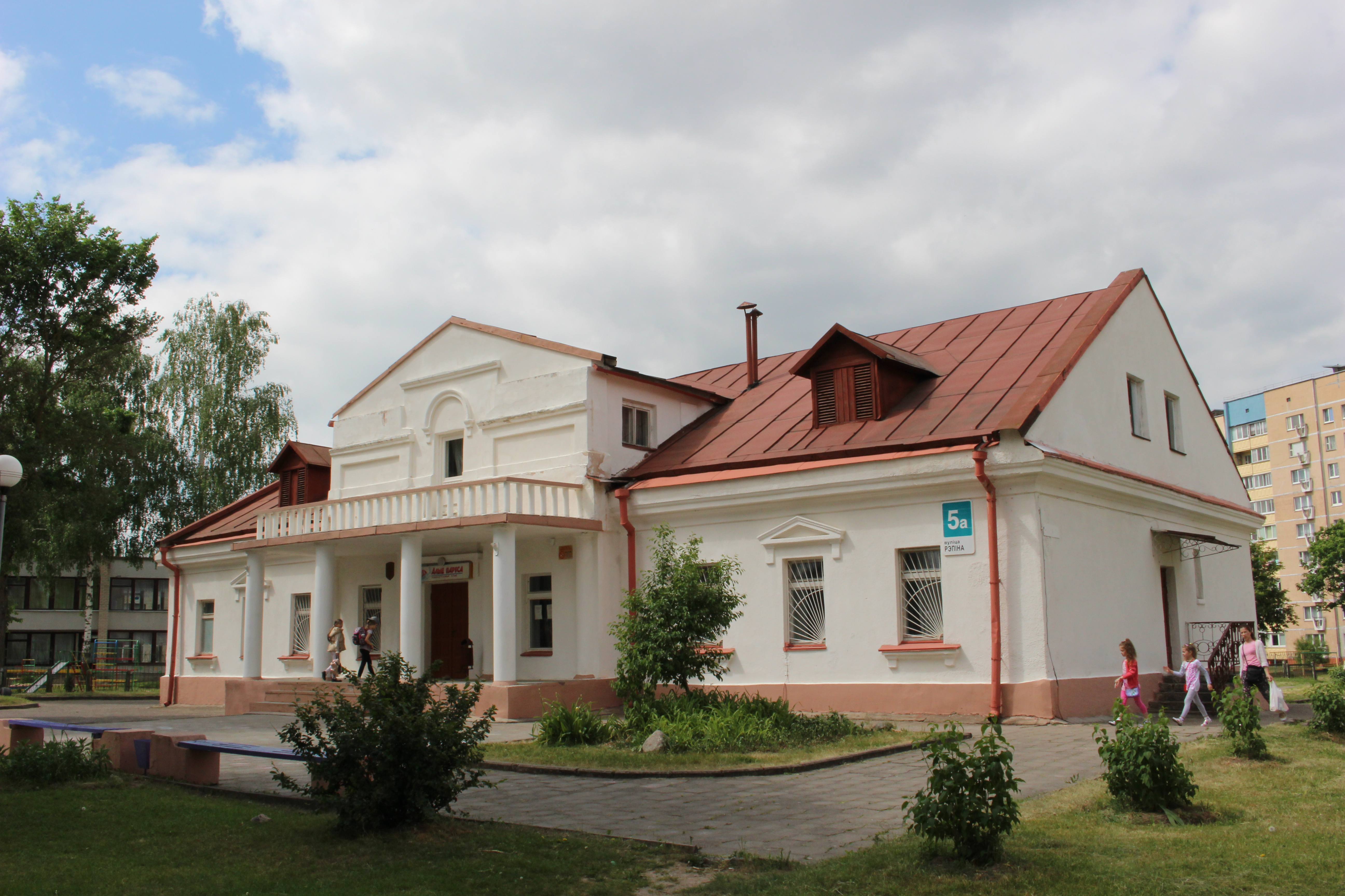 Фрагменты былой сядзібы ў прадмесці Аўгустава:капліцабылая карчма Гродзенскай аканоміі(архітэктар Дж. Сака). г. Гродна_412Г000664 This is a photo of Belarusian heritage monument. Reference number: 412Г000664 ( WLM)